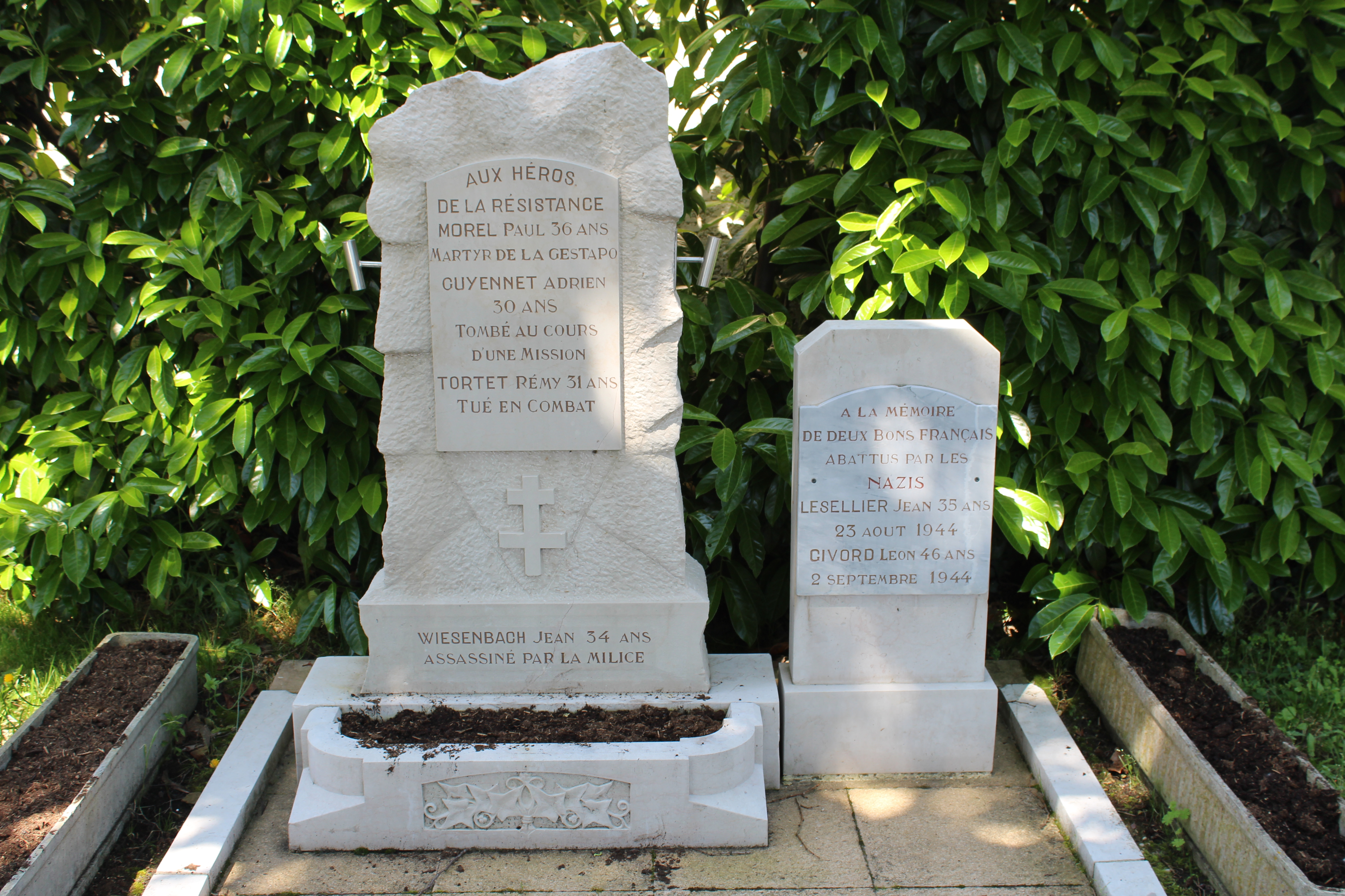 Stèles en mémoire aux résistants de Pont-de-Veyle.